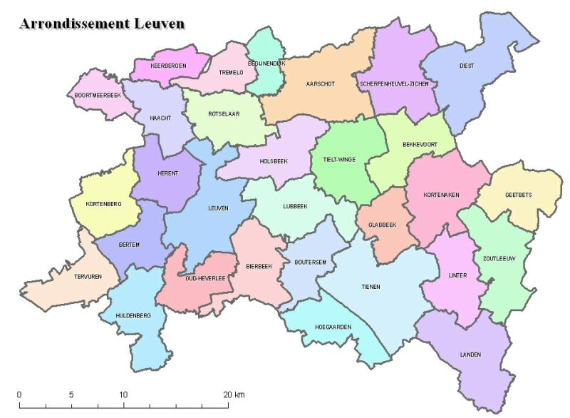 Kaart van Arrondissement Leuven. Eigen werk.